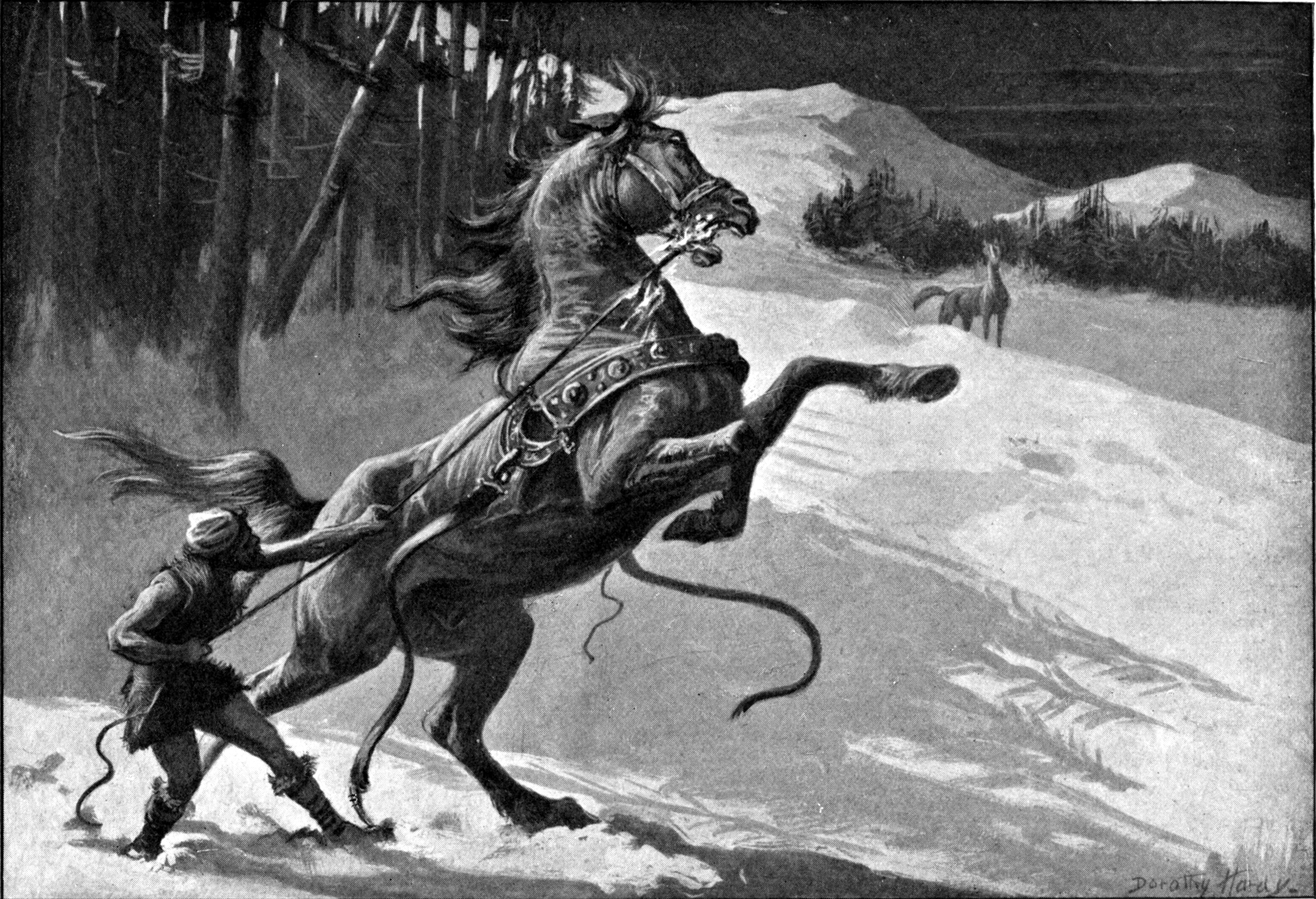 Loki et Svadilfari. Loki, sous une forme de jument, séduit l'étalon Svaðilfari pendant que le géant maître-bâtisseur tente de le retenir. Guerber, H. A. (Hélène Adeline) (1909).